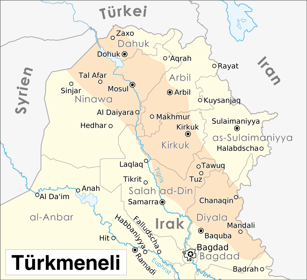 Karte von Türkmeneli